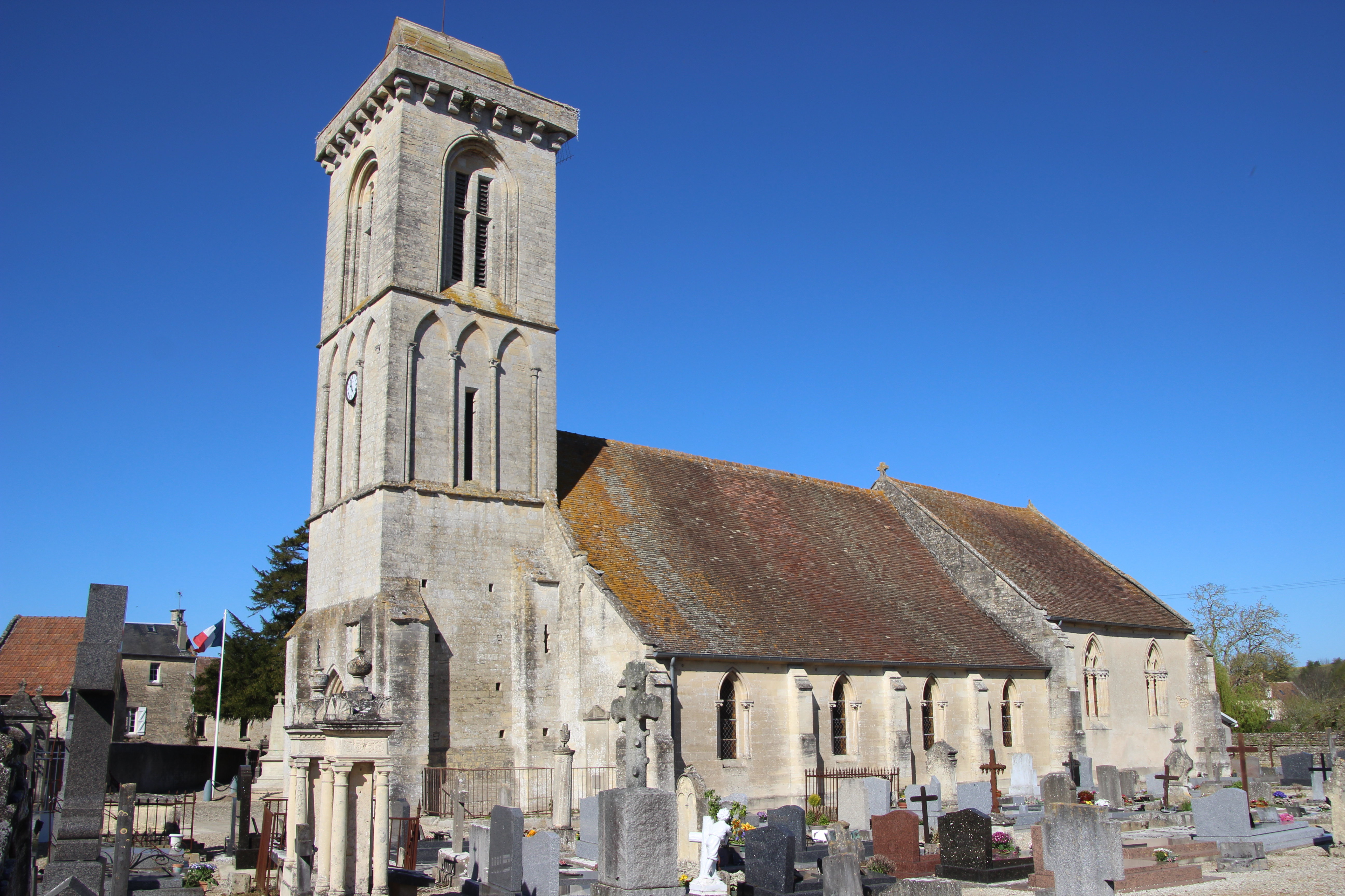 Église Saint-Vigor de Reviers [#100wikicommonsdays day 82]